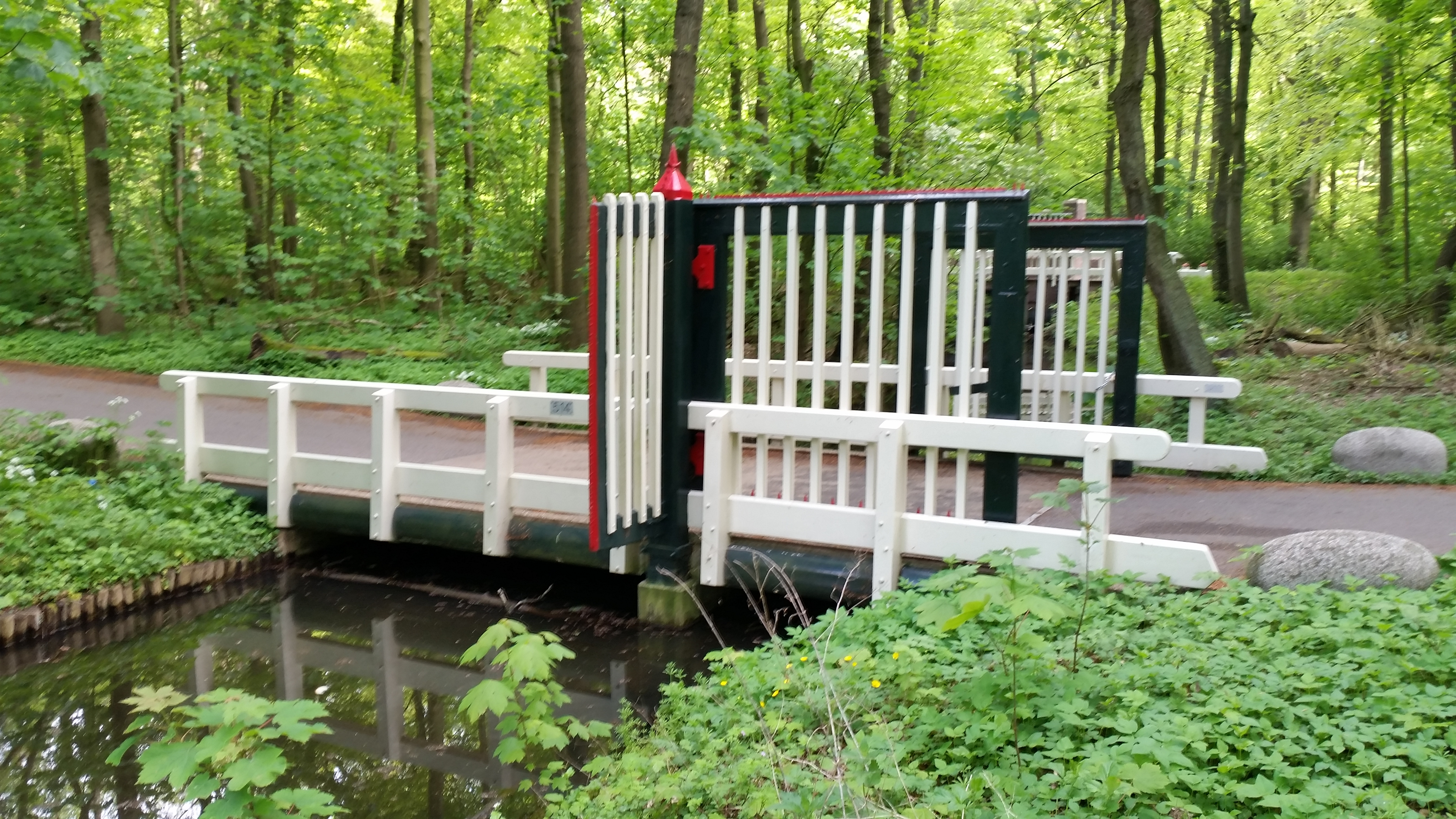 Zijaanzicht van Brug 514 (in Amsterdam)